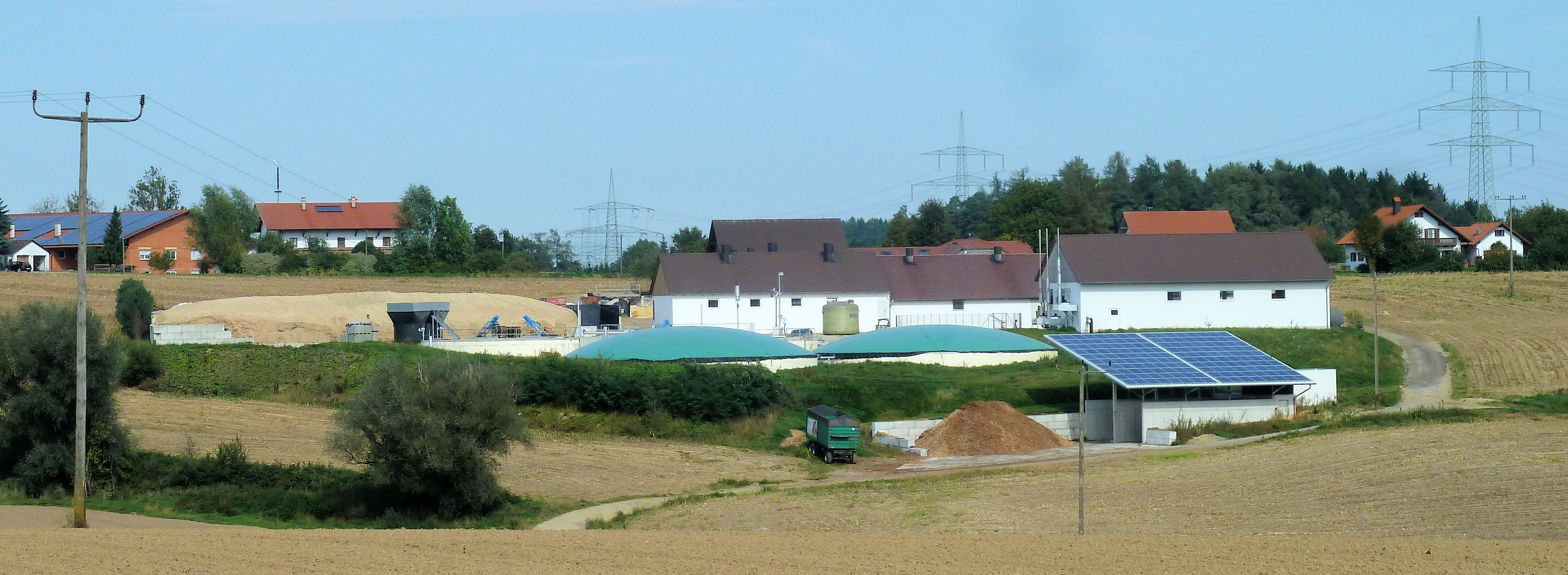 Adlkofen - Biogasanlage im Ortsteil Santing